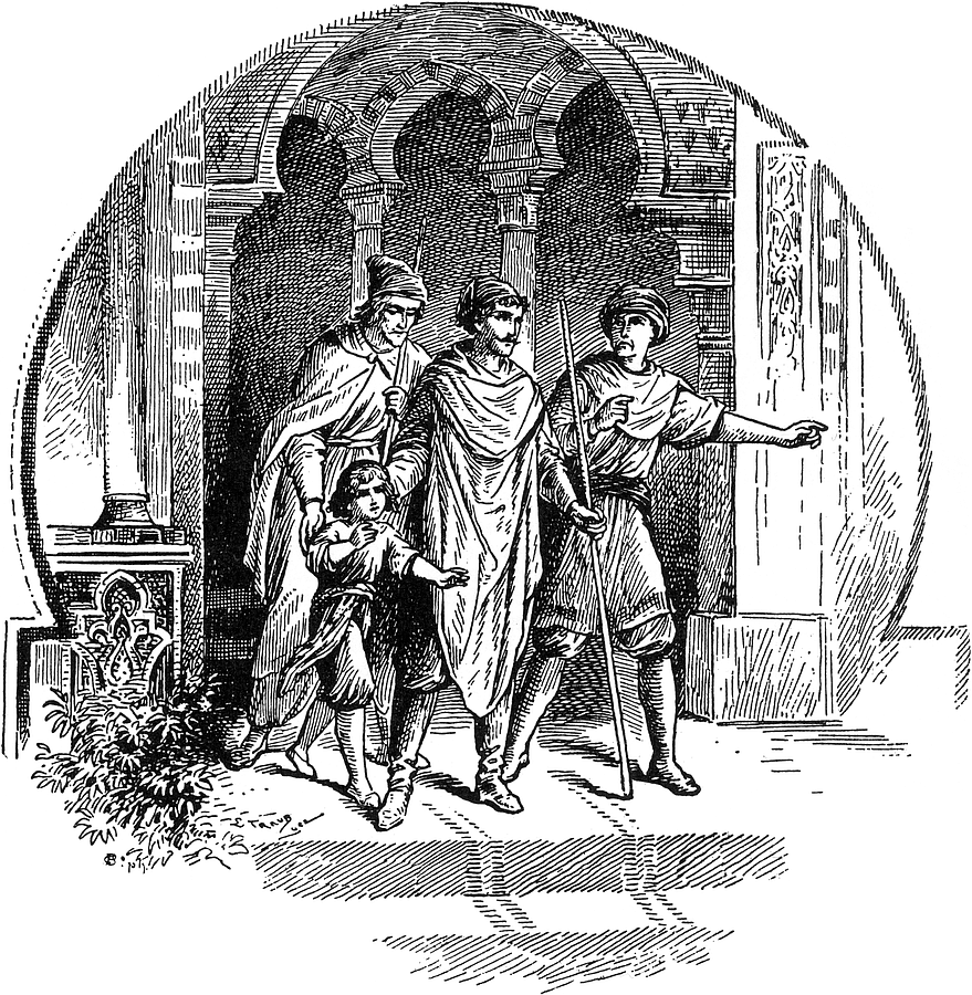 Der Kutb